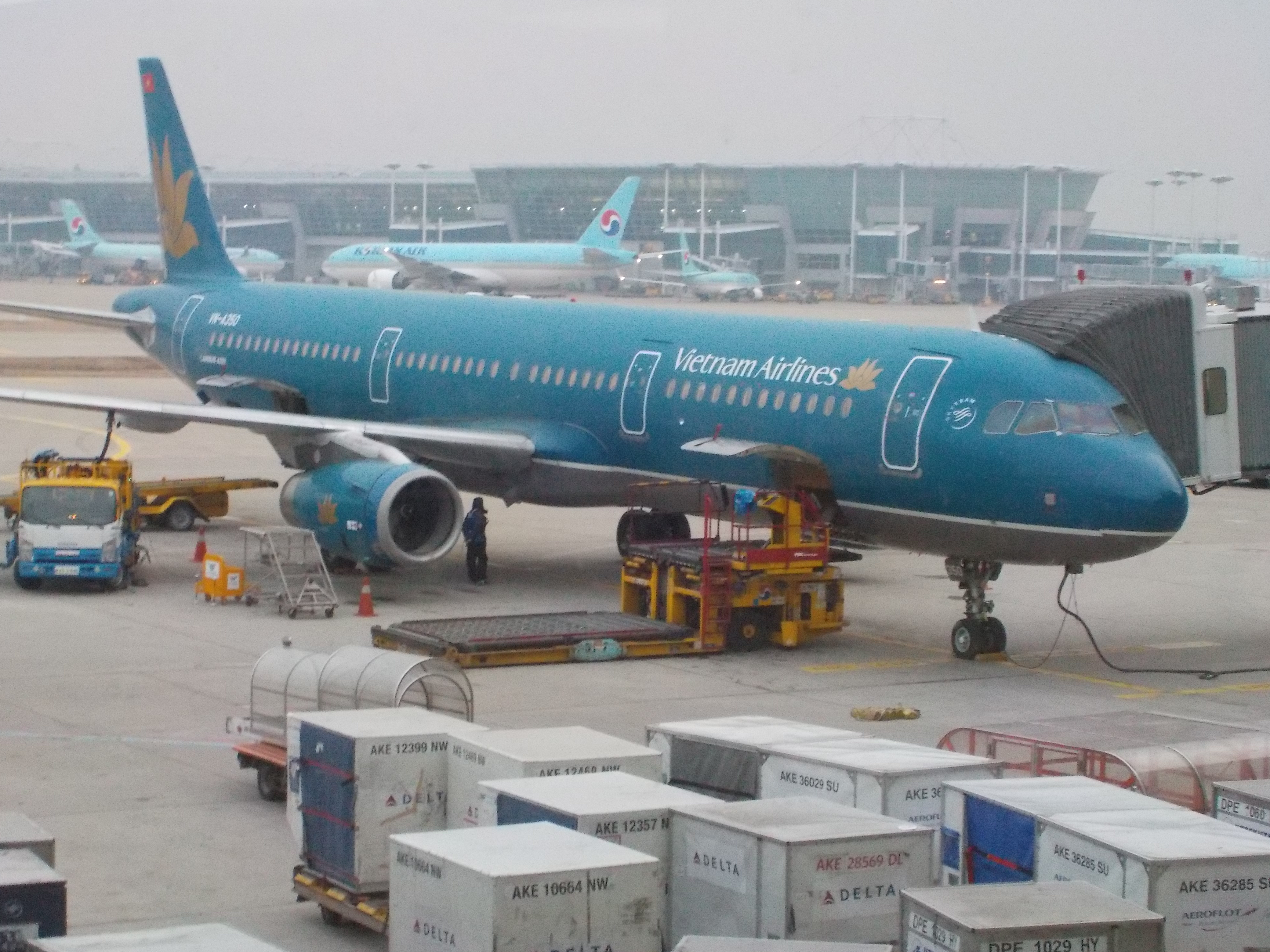 ベトナム航空のエアバス A321-231 VN-A350 仁川国際空港にて撮影。これからホーチミンシティに帰ろうとしている。